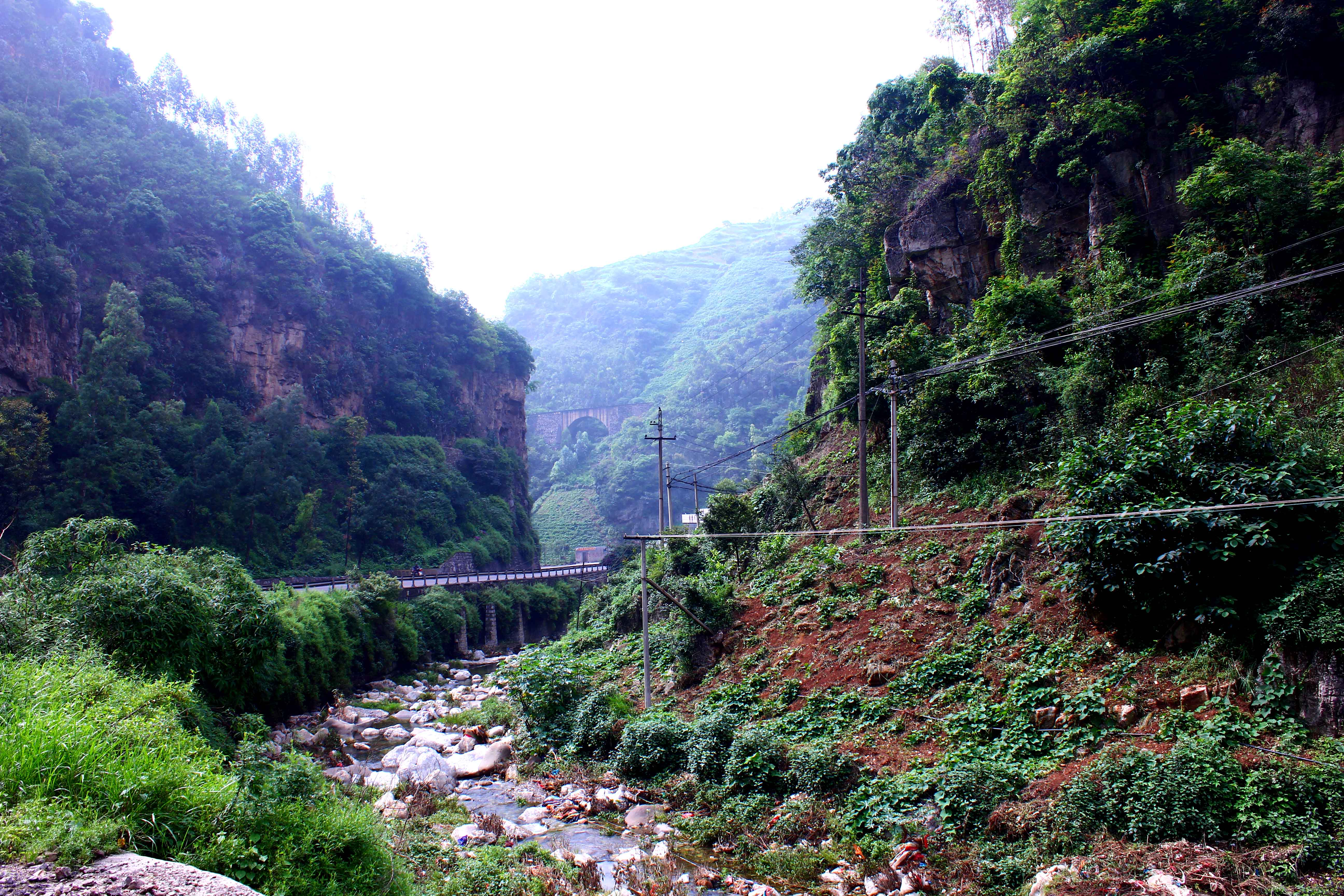 云南省昆明市宜良县摆衣河